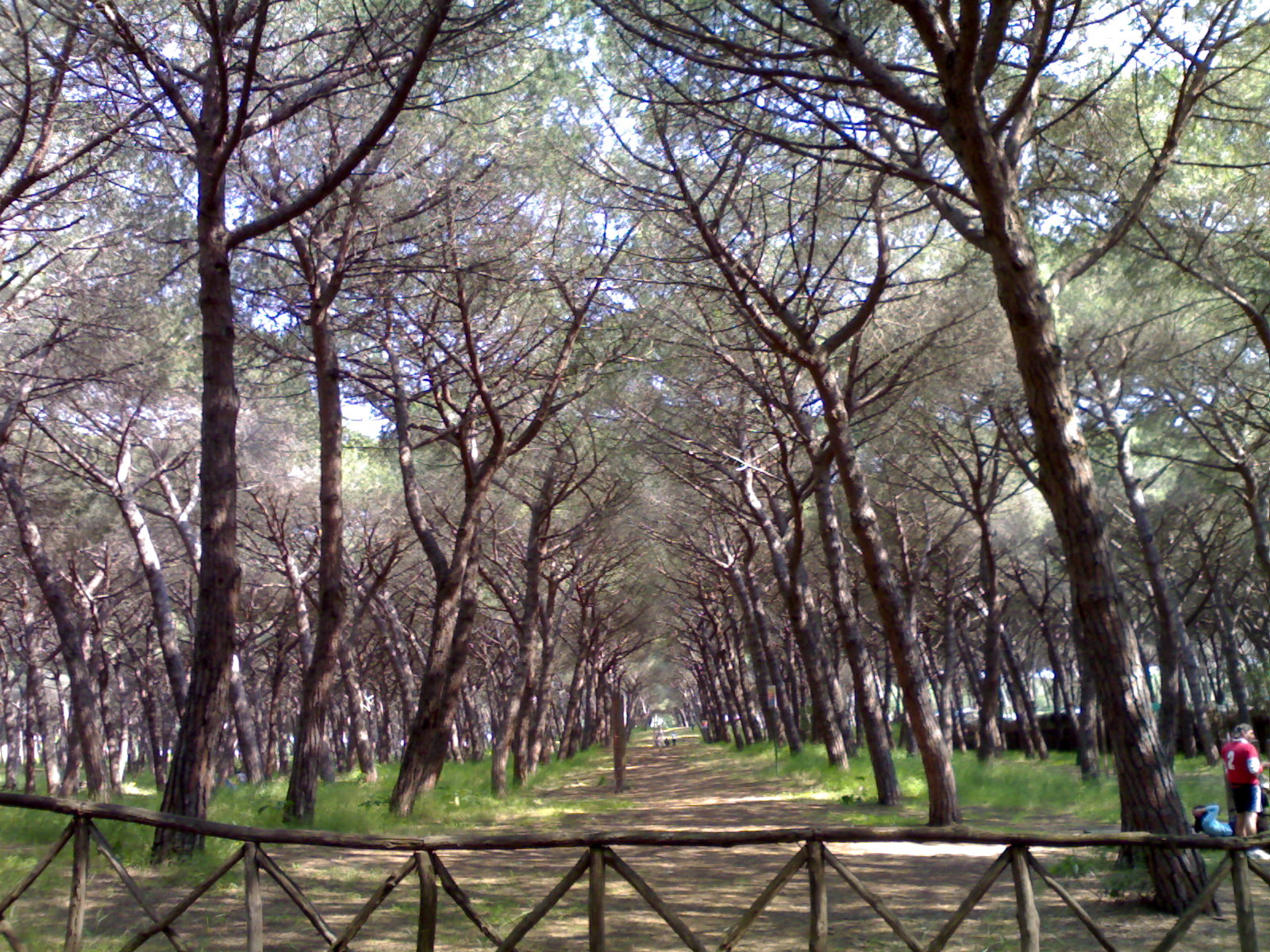 Pineta di Montalto Marina